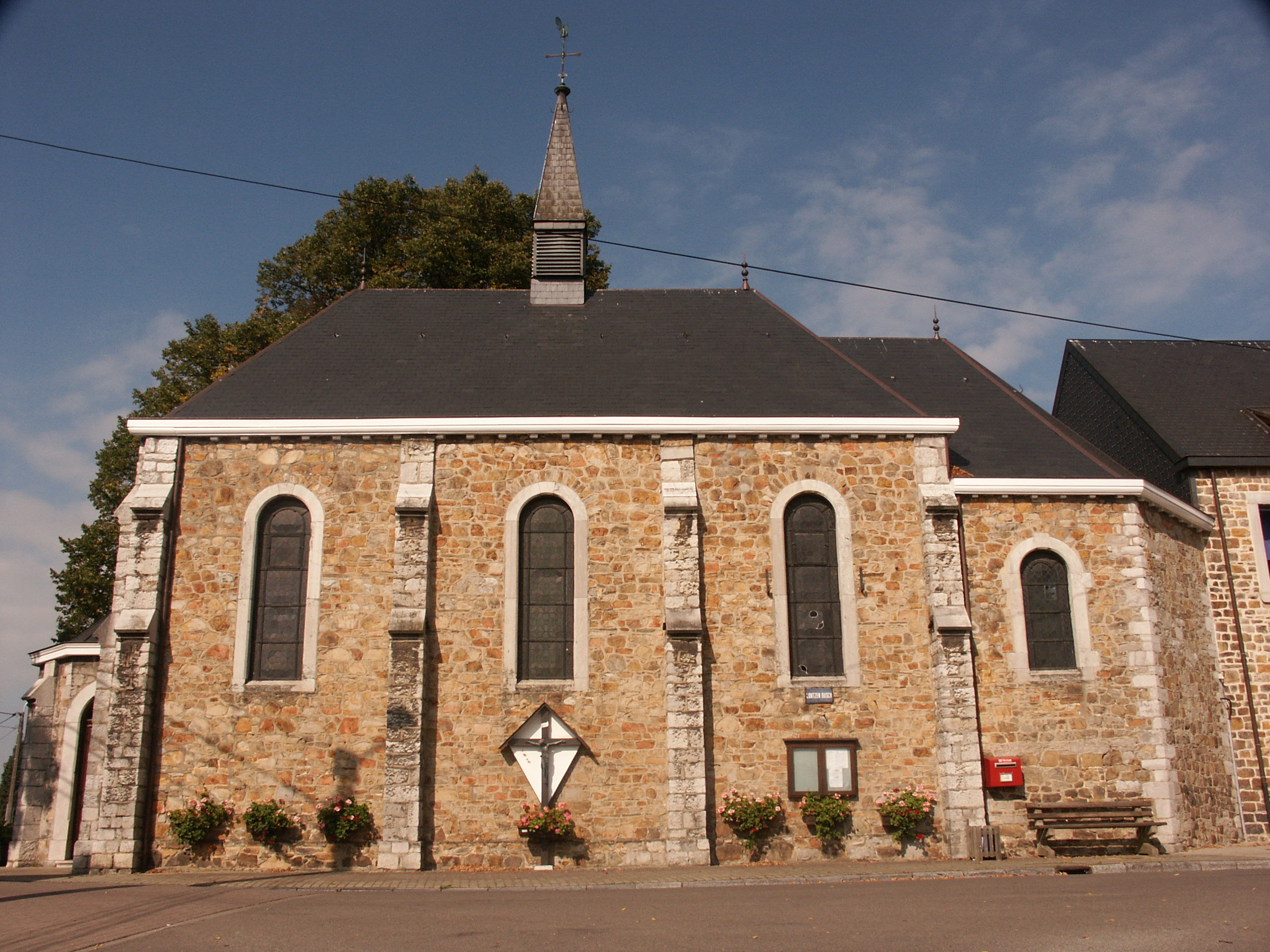 St. Annakapelle in Lontzen-Busch